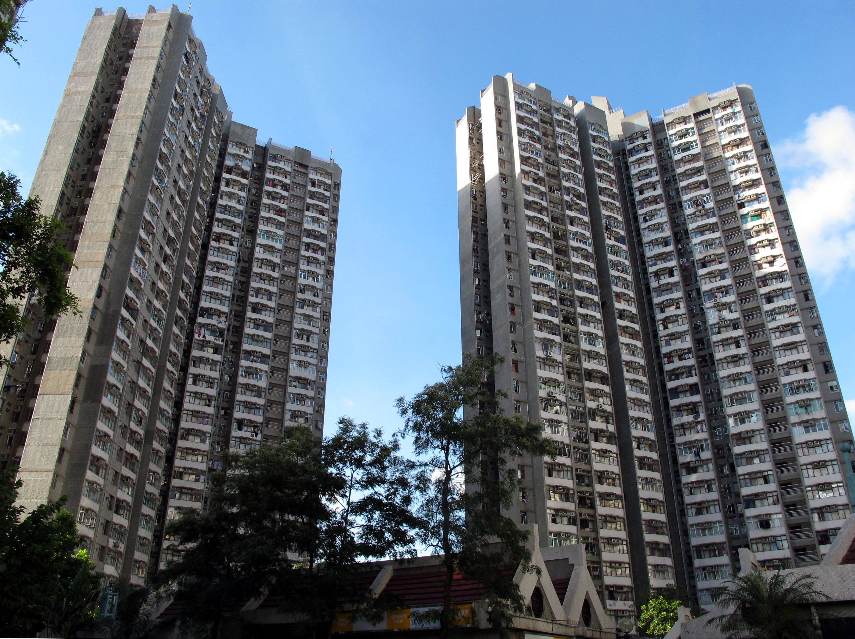 Tsui Wan Estate 翠灣邨